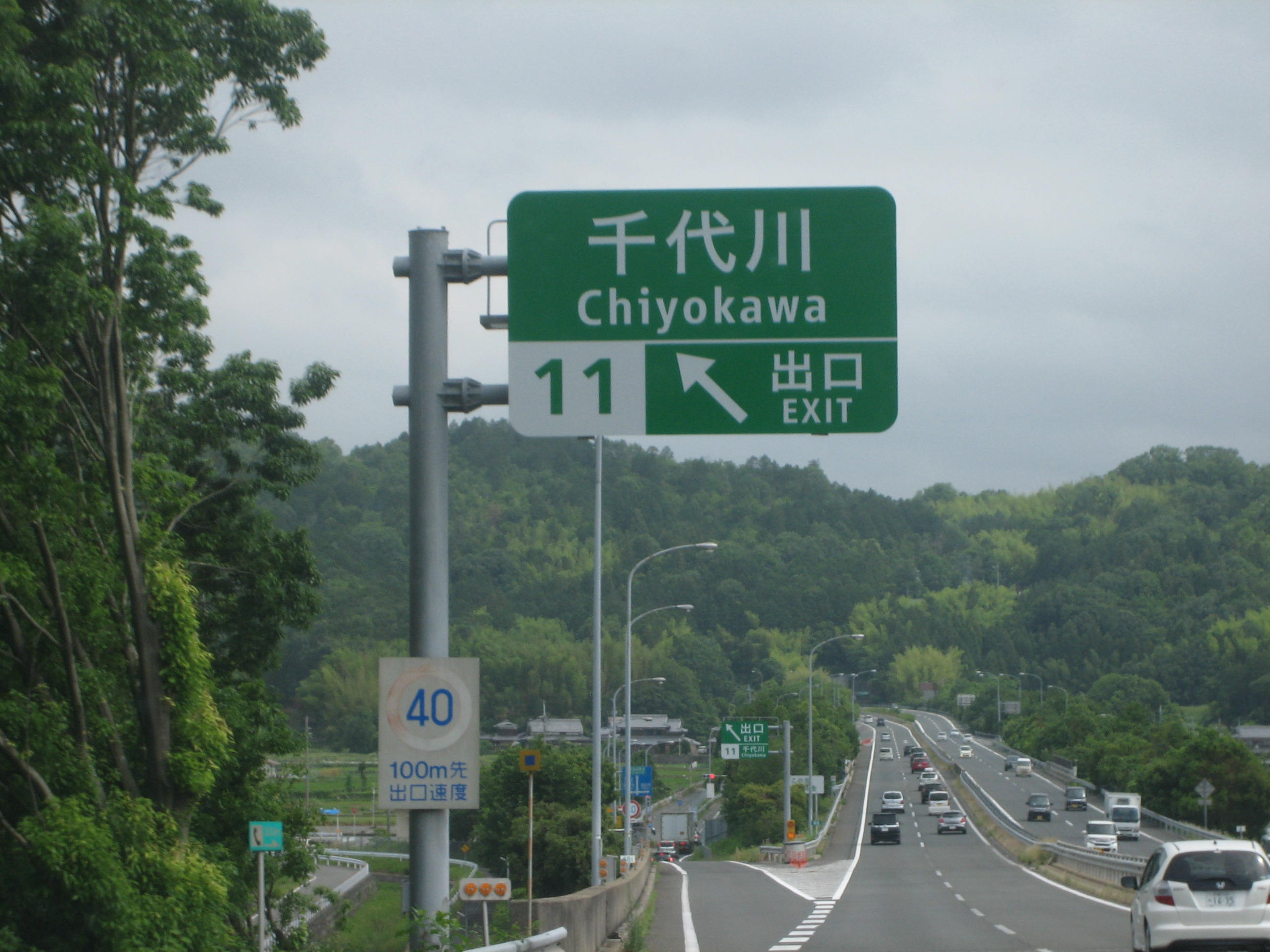 千代川IC